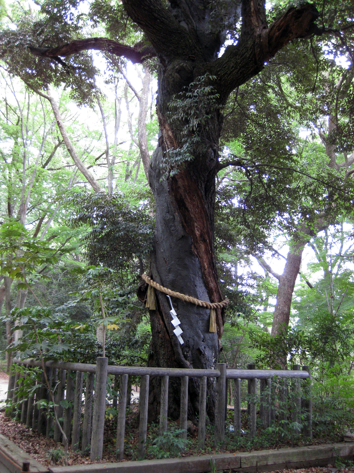 Tadasu_no_mori ("糺の森") in Shimogamo Jinja ("賀茂御祖神社（下鴨神社）"), Kyoto Pref. Japan.